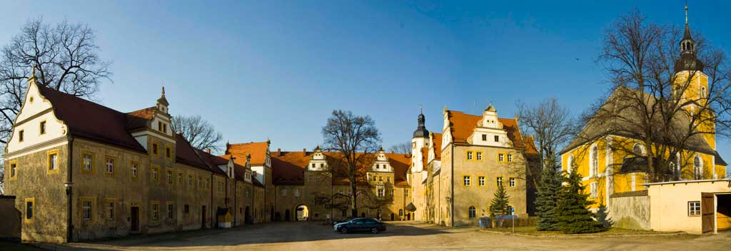 Wermsdorf Panorama Altes Jagdschloß und Ev.-luth Kirche - Schloßhof